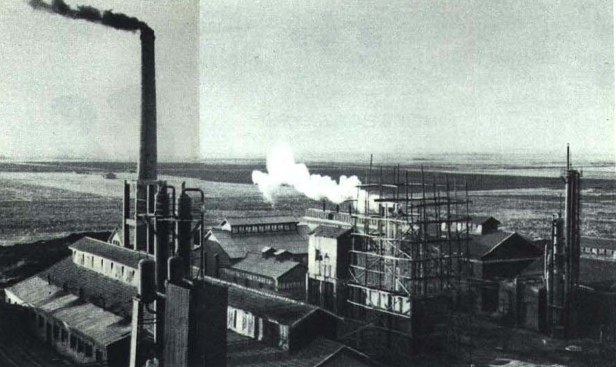 1964-03 1964年 沈阳开原合成氨厂